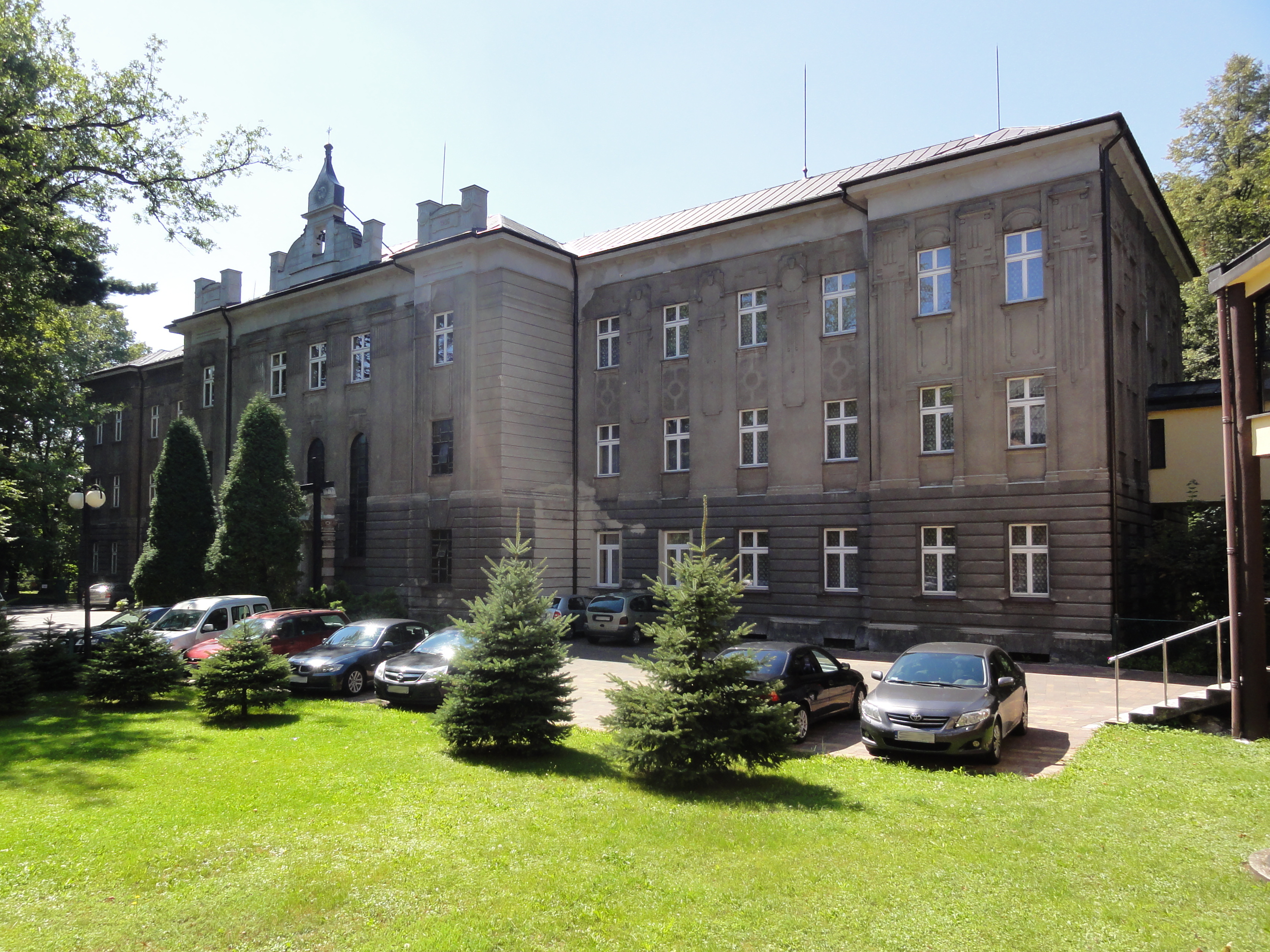 Dom Rekolekcyjny pod Opieką św. Józefa w Czechowicach-Dziedzicach